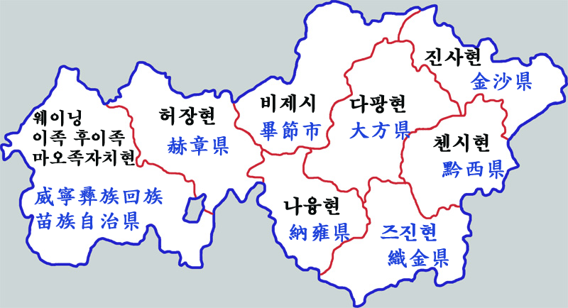 비제지구 현급구역